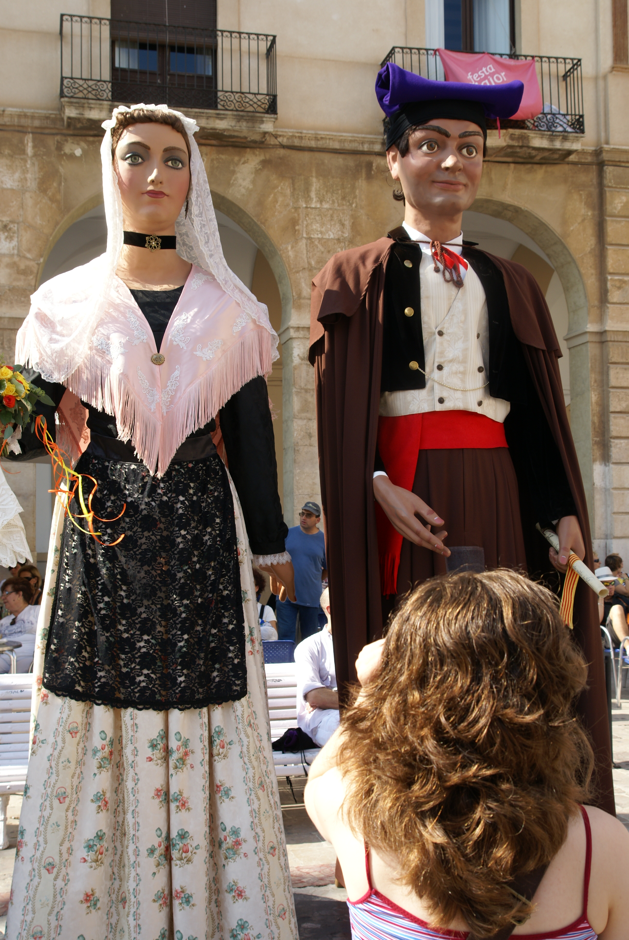 Plantada de gegants a la plaça de la Vila, de Vilanova i la Geltrú dins la mostra de gegants centenaris de la Festa Major 2009.